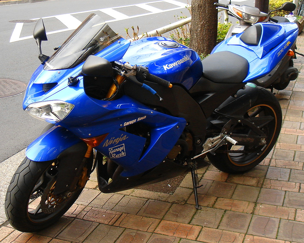 Kawasaki ZX-10R 2004